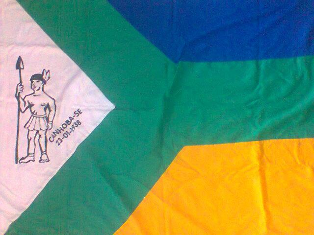 Bandeira Municipal de Canhoba-SE